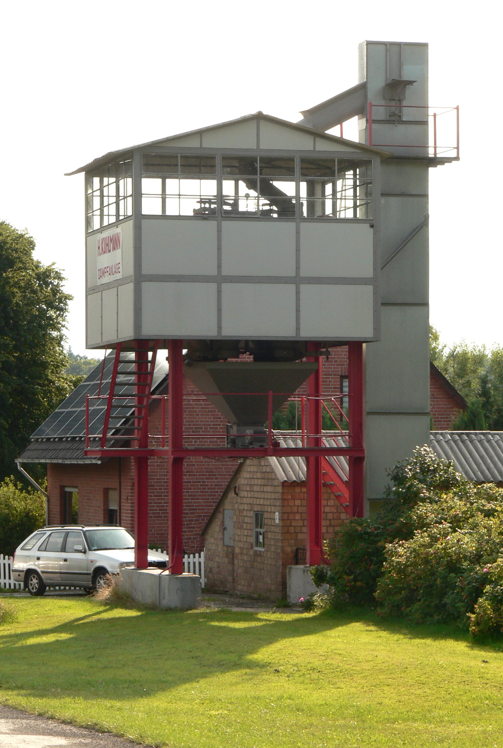 Kartoffeldämpfanlage Stöckse von der Seite mit Elevator